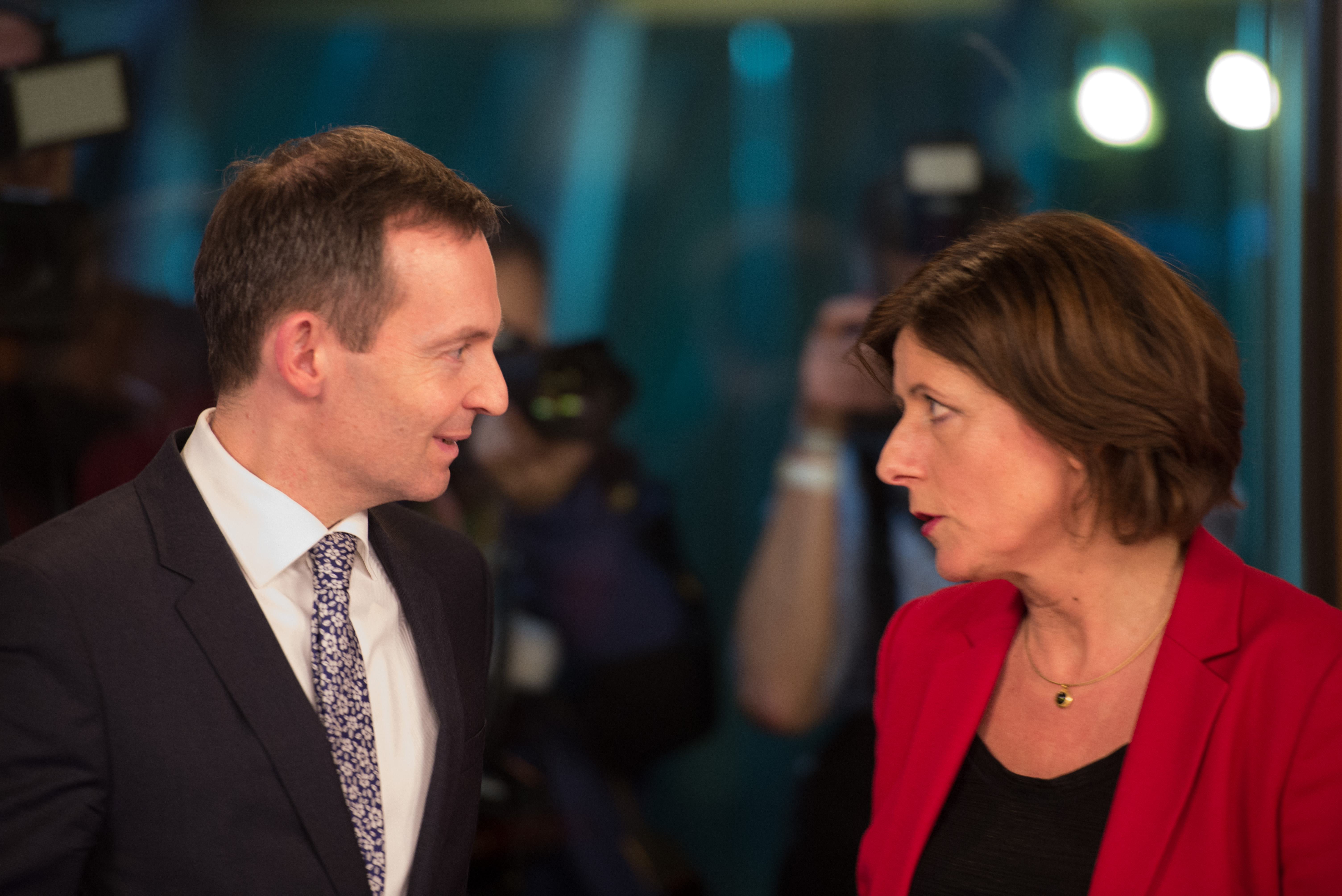 Interviewrunde des ZDF gegen 19:00 Uhr am Abend der Landtagswahl am 13. März 2016 im Abgeordnetenhhaus